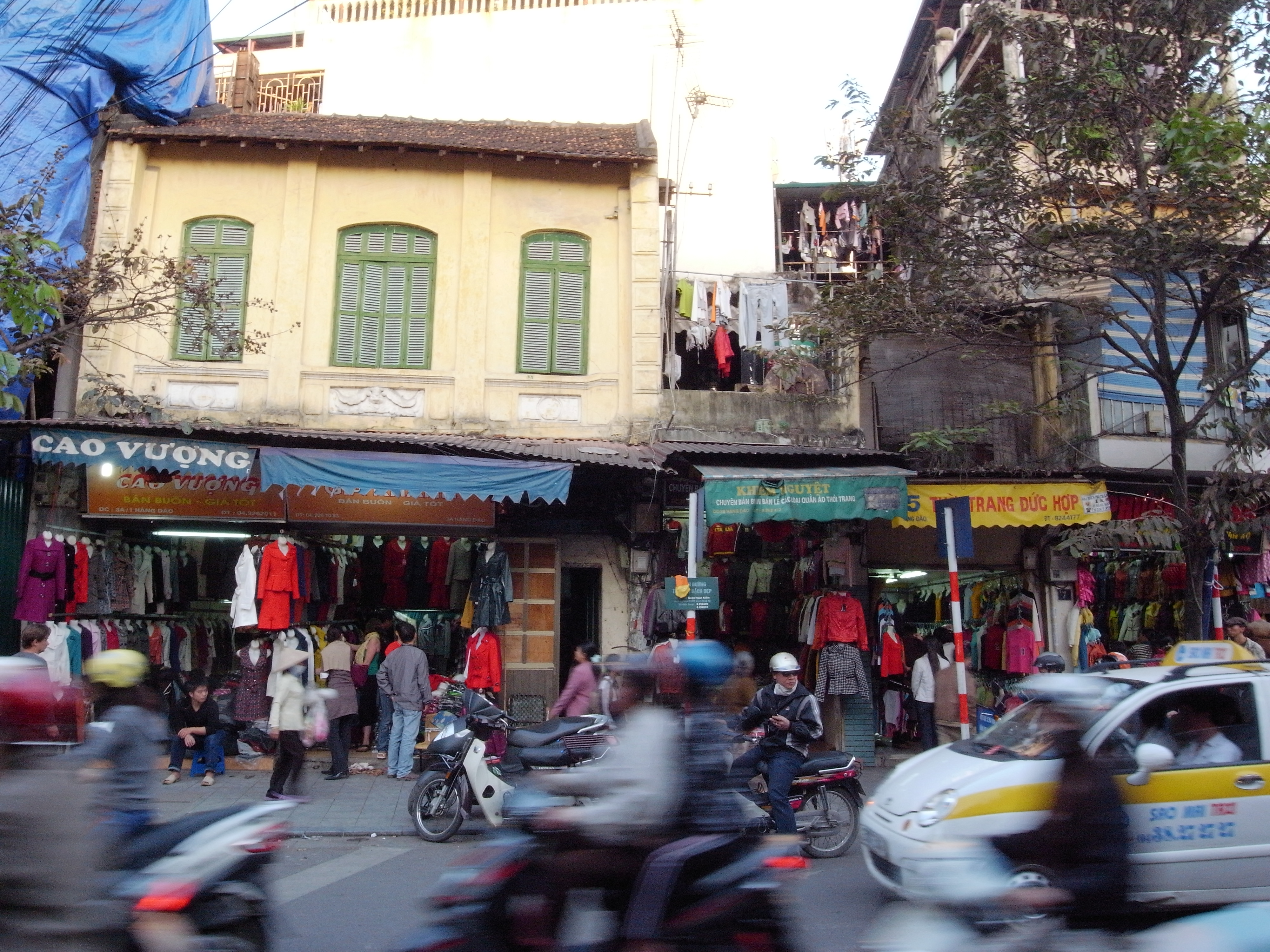 Hàng Đào street, Hanoi.